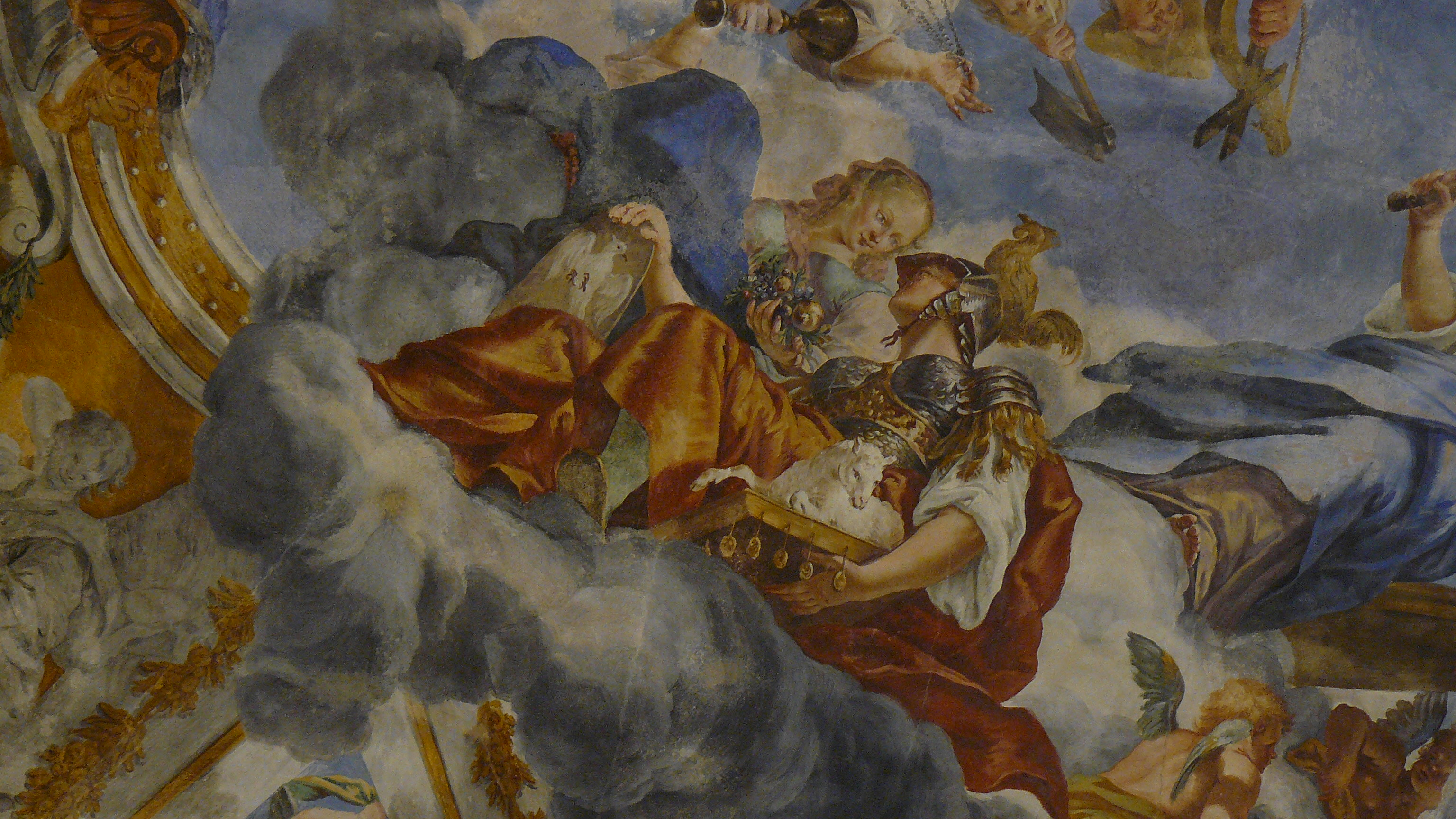 Chiesa di san Francesco